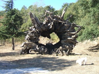 Tronc de châtaignier millénaire détruit par un incendie. Il est tellement grand que l'on tient dedans.